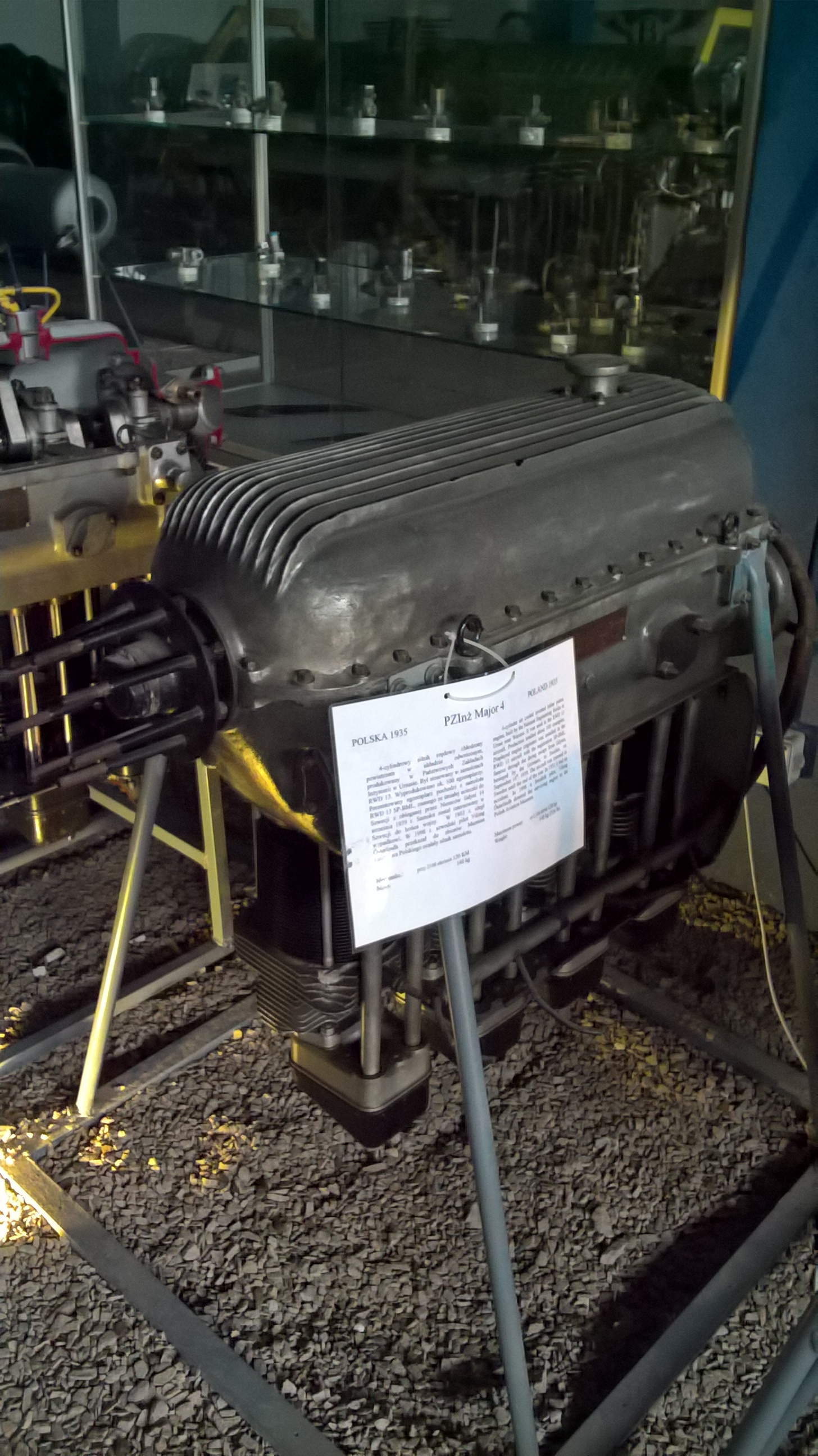 Licencyjny czechosłowacki 4-cylindrowy silnik rzędowy Walter Major z 1935 r. produkowany w Państwowych Zakładach Inżynierii w Ursusie pod nazwą PZInż. Major Typ 4, ze zbiorów Muzeum Lotnictwa Polskiego w Krakowie.